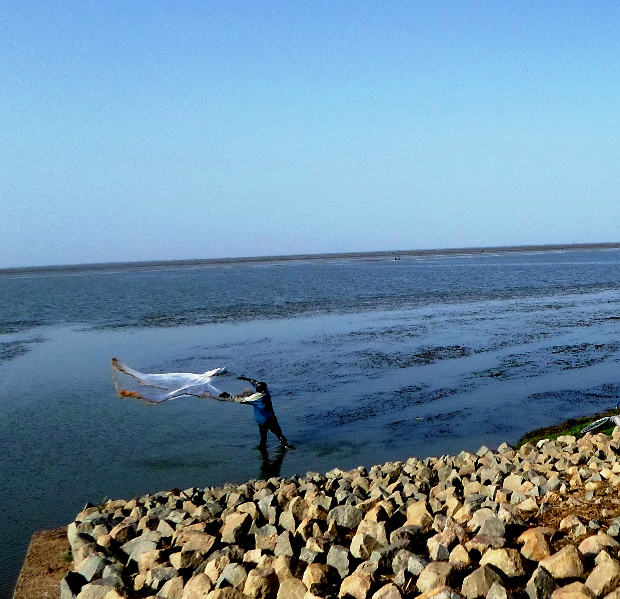 Vues du lac de Maga Localisation : Mayo-Danay, Extrême-Nord